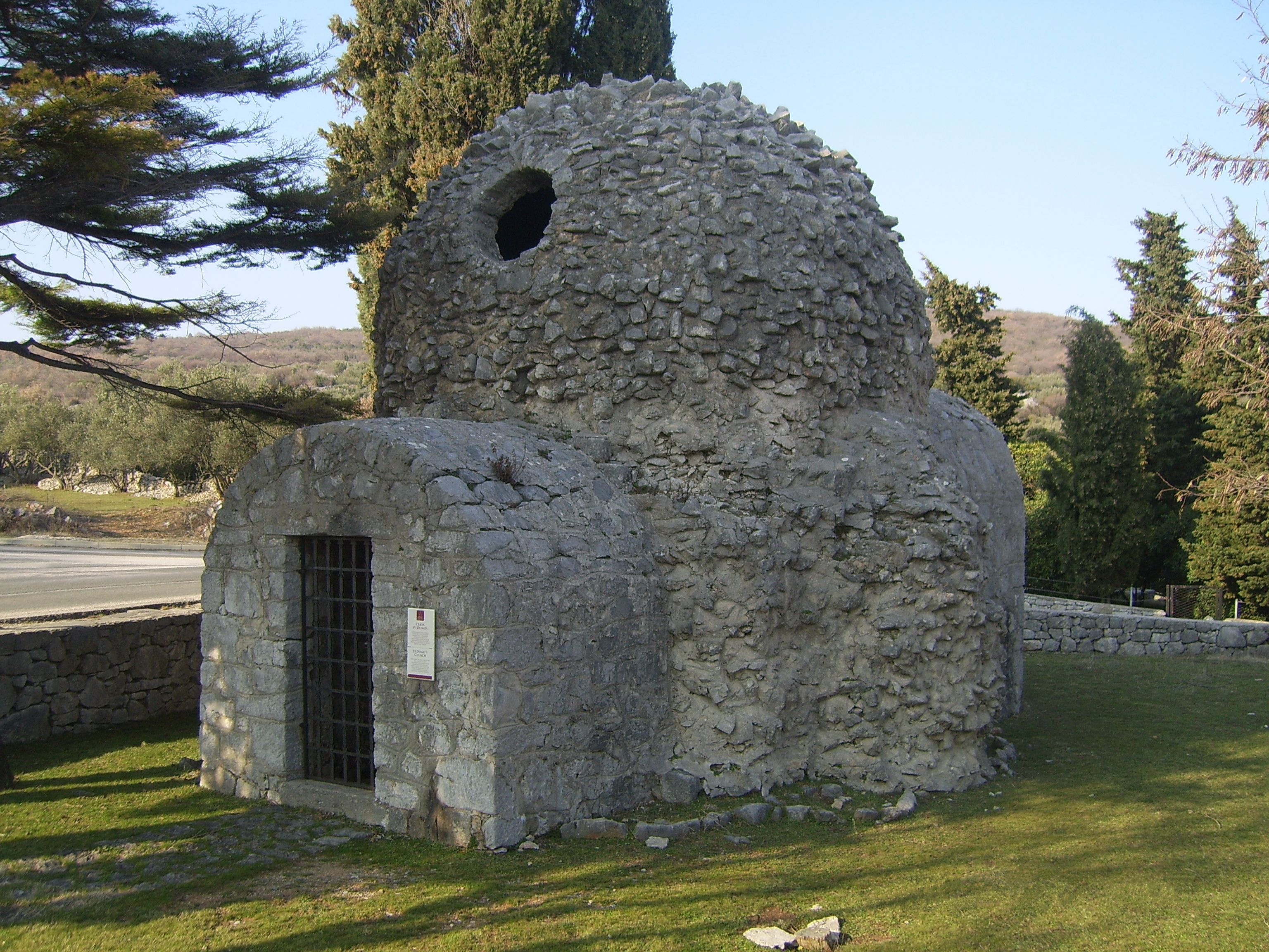 starohrvatska arhitektura, crkvica svetog Dunata kraj Punta na otoku Krku, 9. st.